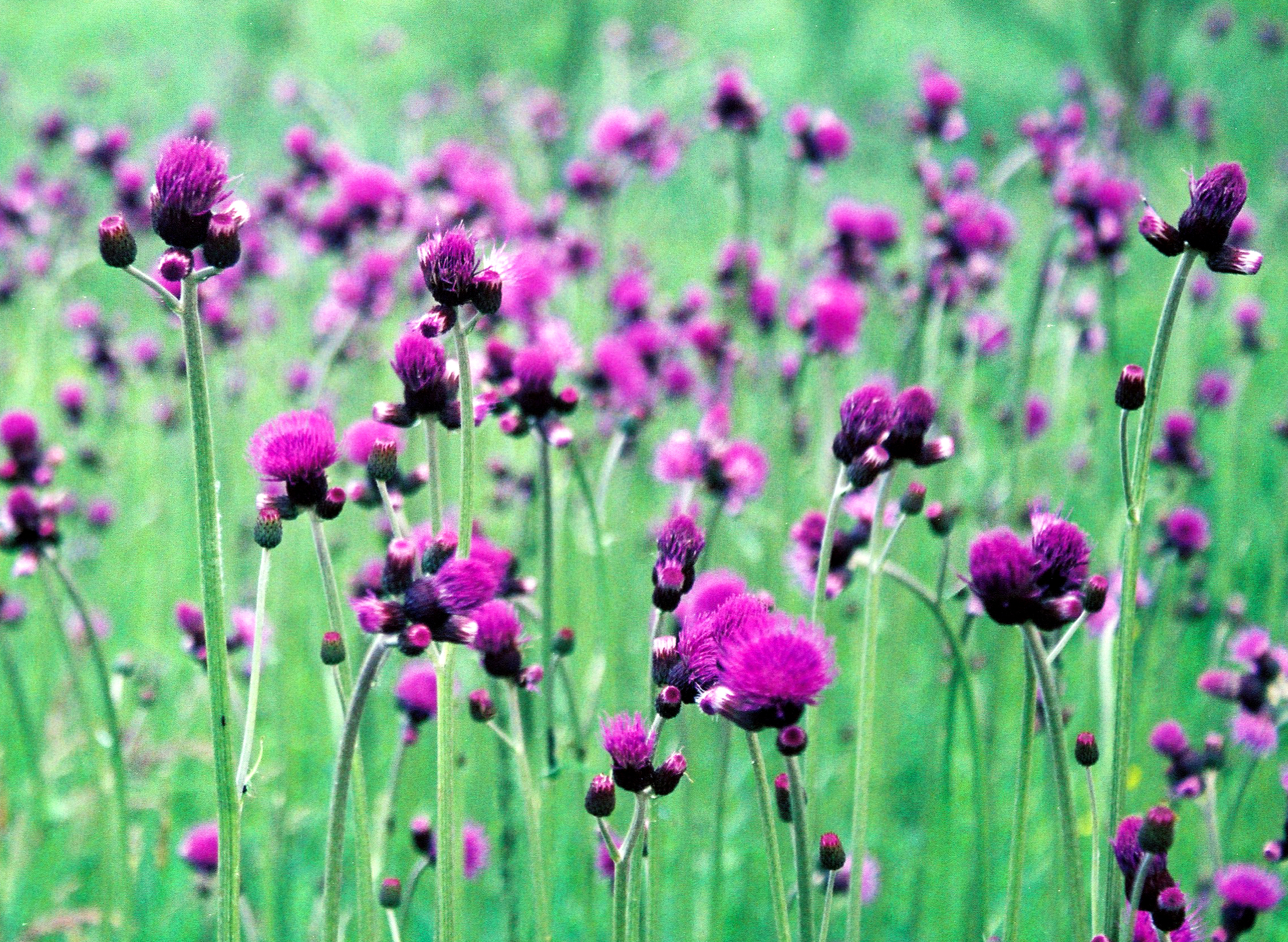 do identyfikacji Cirsium rivulare